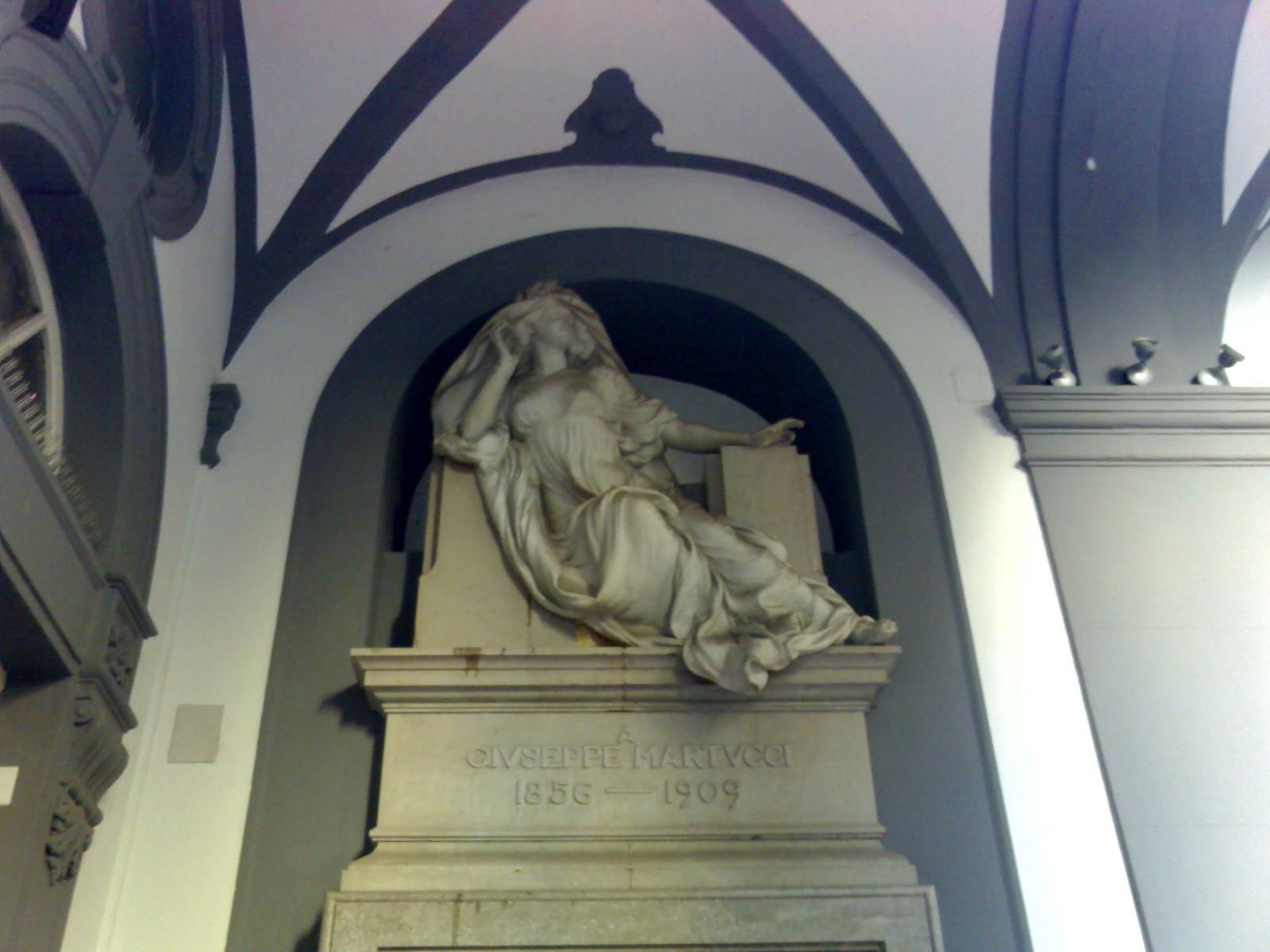 Scultura del conservatorio di San Pietro a Majella (Napoli)